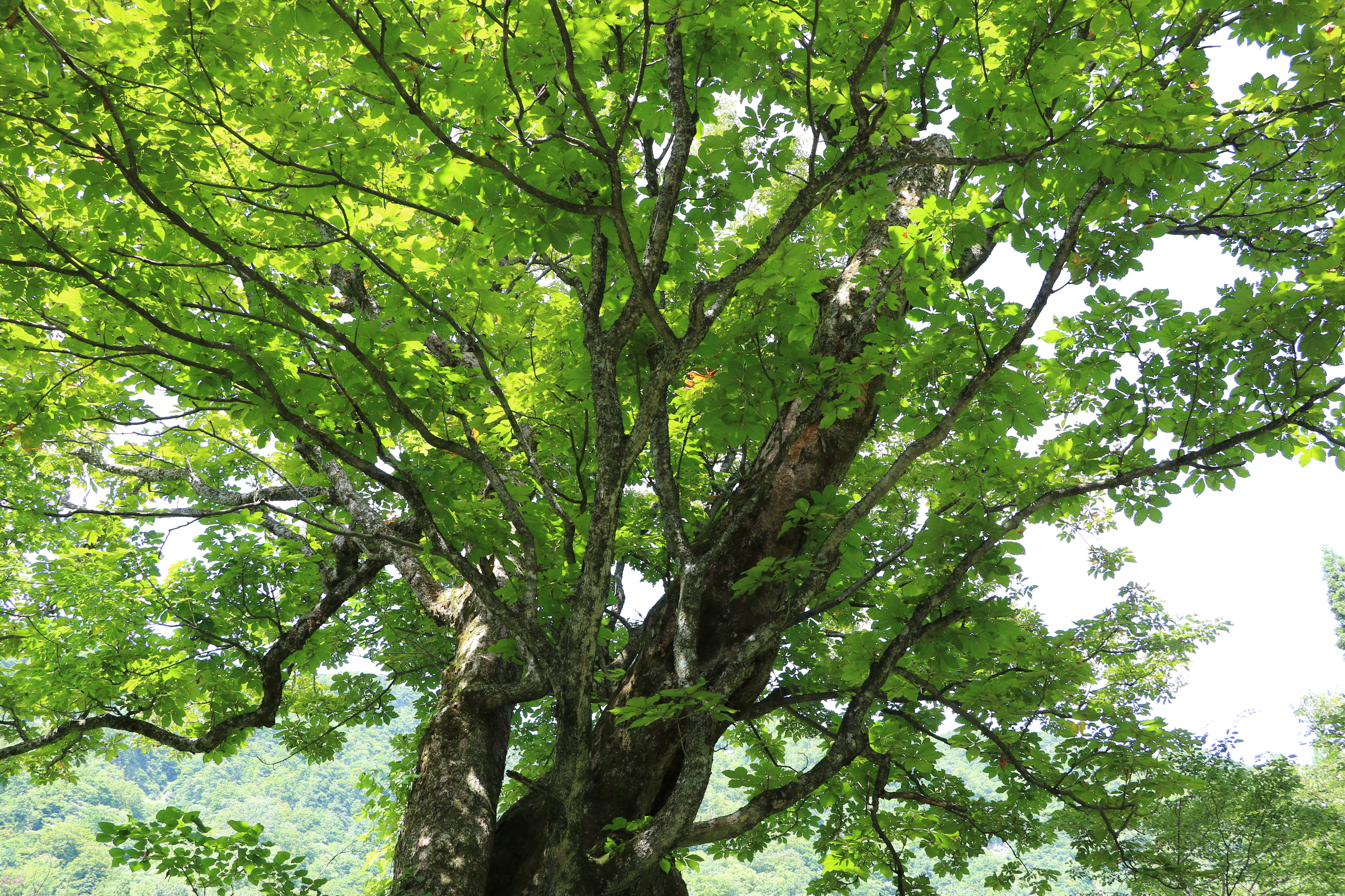 国指定天然記念物 脇谷のトチノキ（富山県南砺市利賀村）